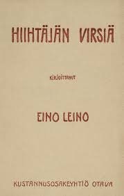 Eino Leino Hiihtäjän virsiä (1900) kansi